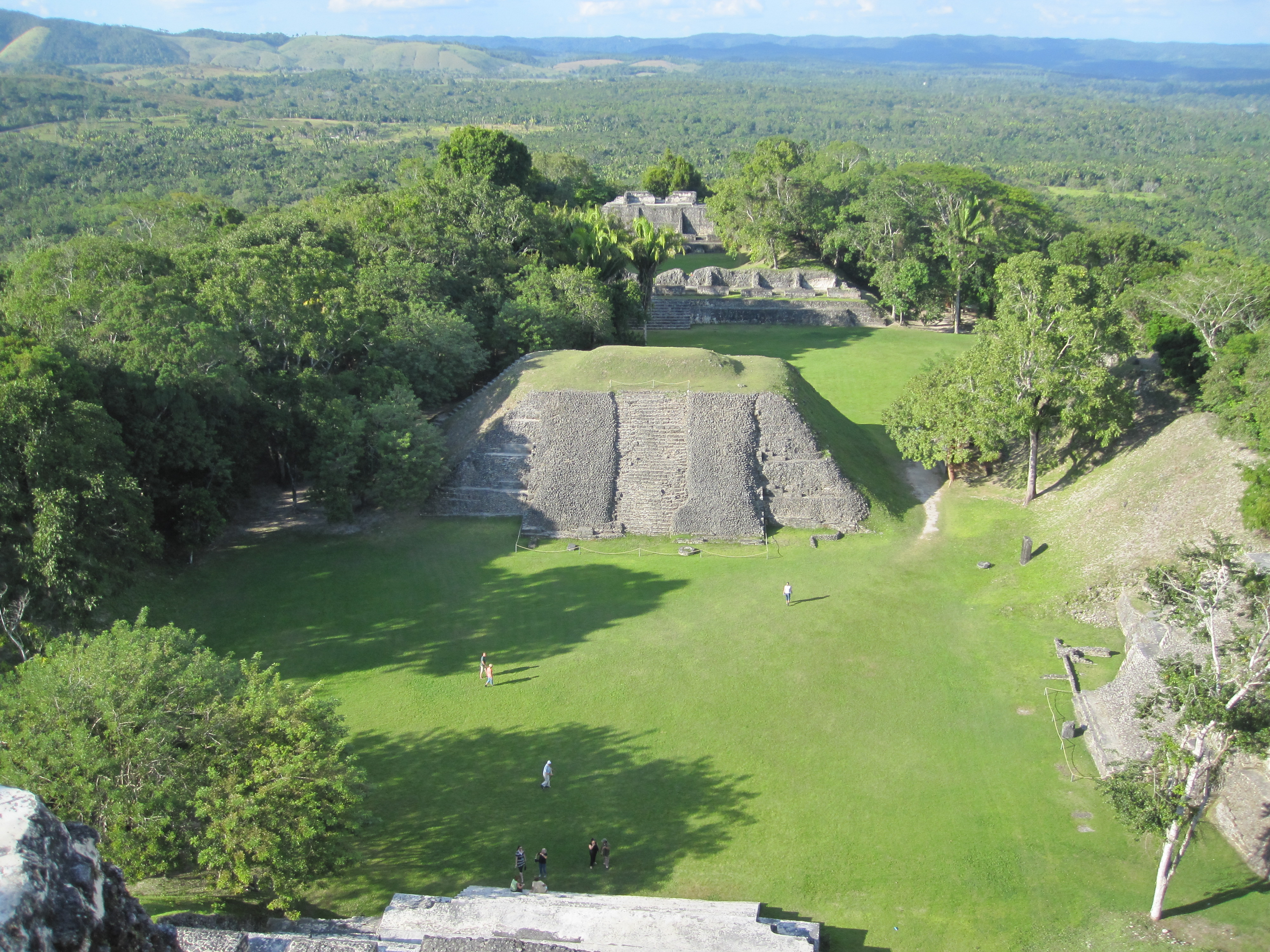 Aussicht von El Castillo ( A6)